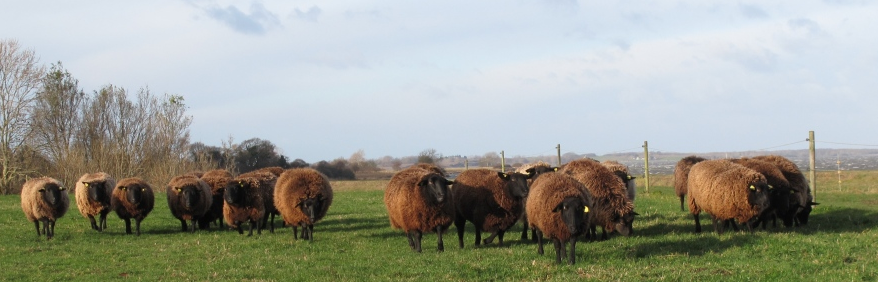 Fåreflok med den karakteristiske brune pels